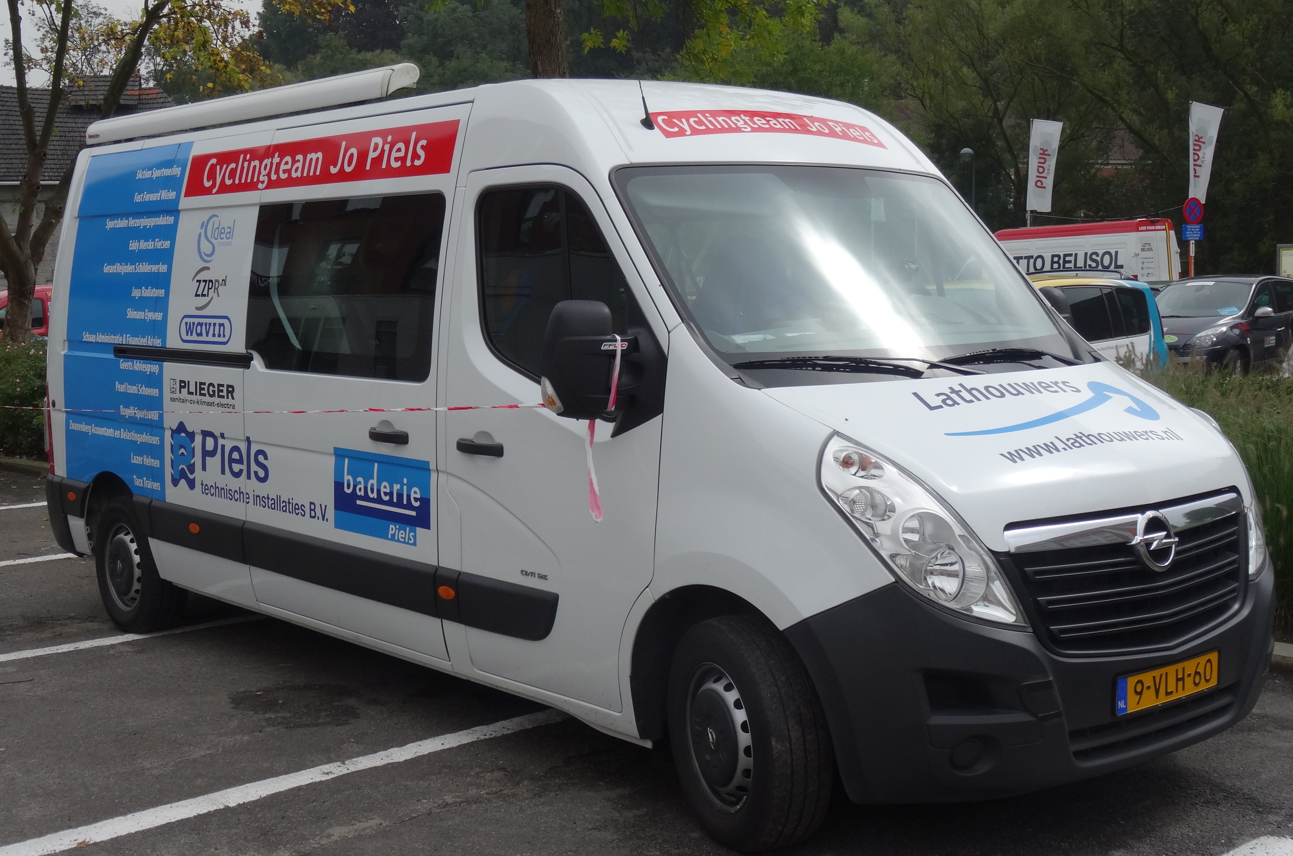 Reportage photographique réalisé le mercredi 27 août à l'occasion de l'arrivée de la Druivenkoers Overijse 2014 à Overijse, Belgique.